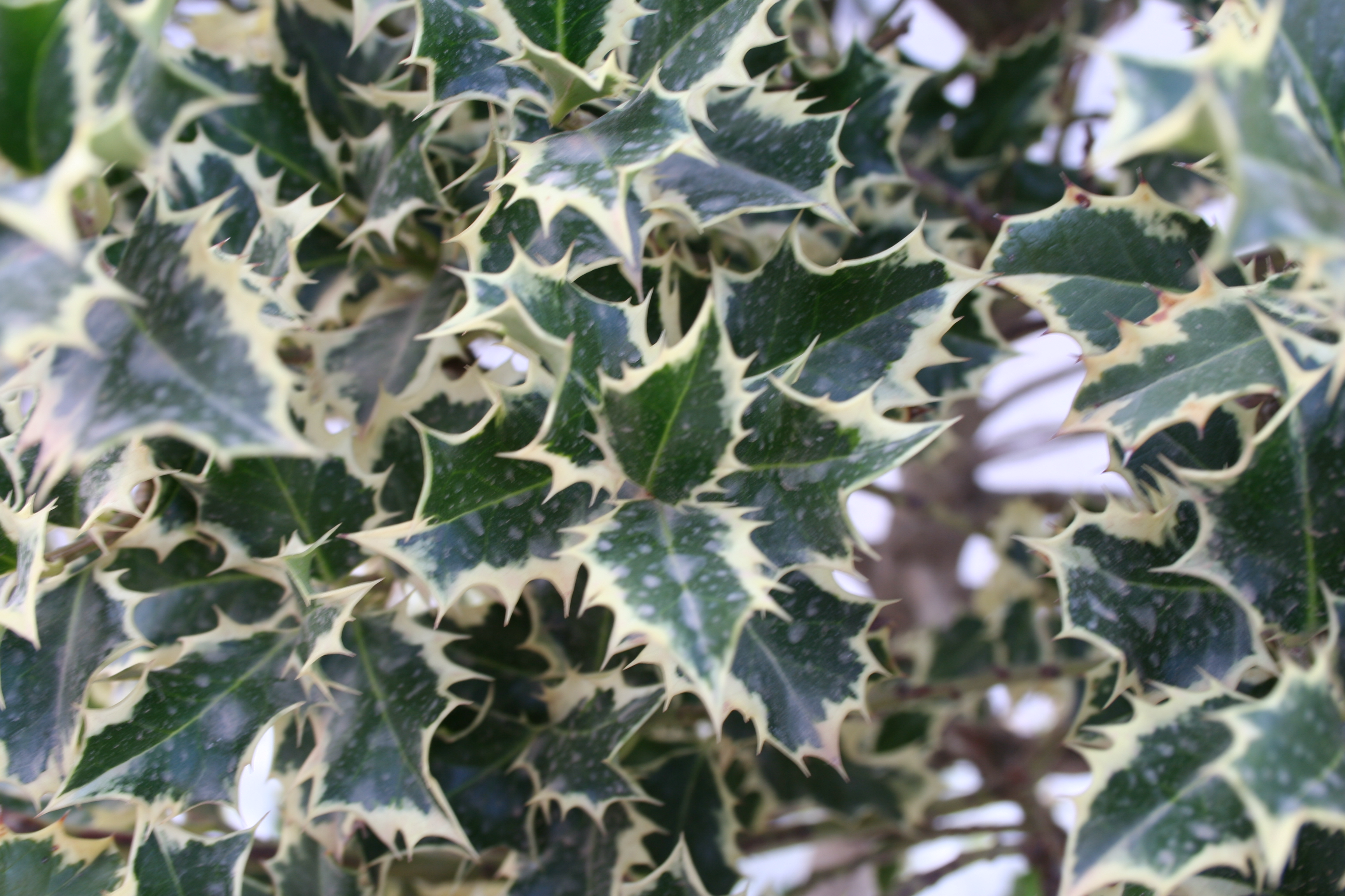 Variedad de acebo.